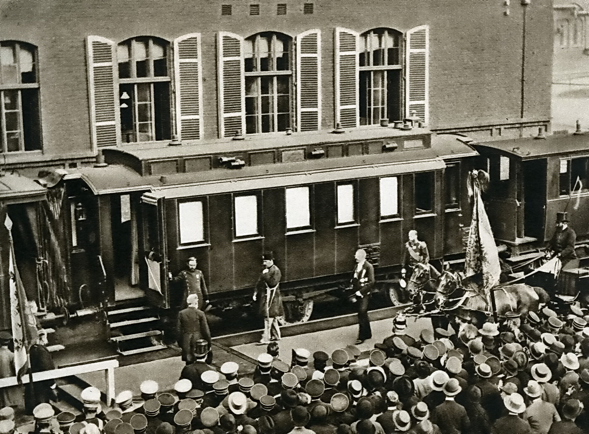 Nāser ad-Din Schah besteigt nach dem Besuch der Krupp-Werke in Essen am 16. Juni 1889 seinen Salonwagen zur Weiterreise nach Amsterdam.